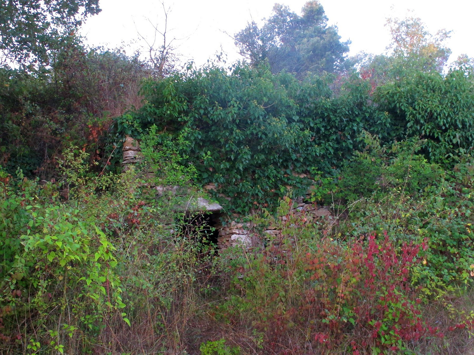 Barraques de vinya al camí de la Grossa (Calders)